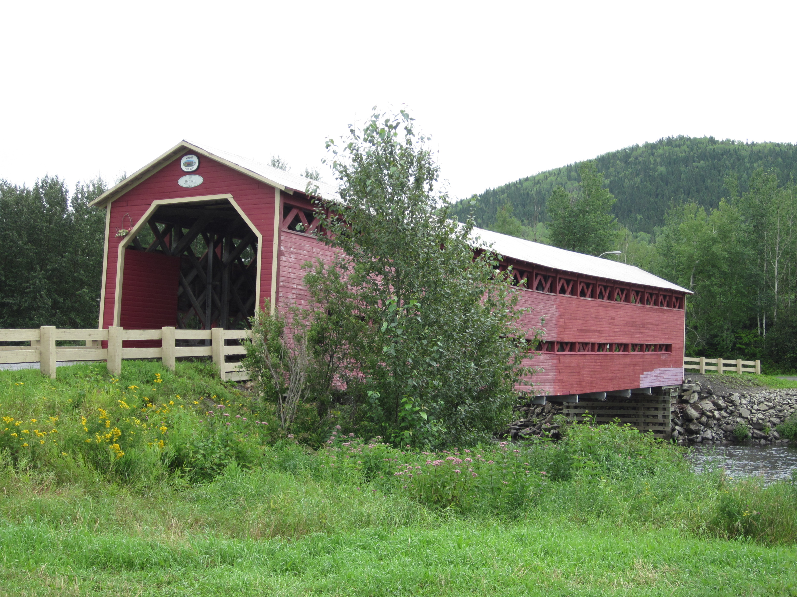 Pont Heppell vue de l'Ouest